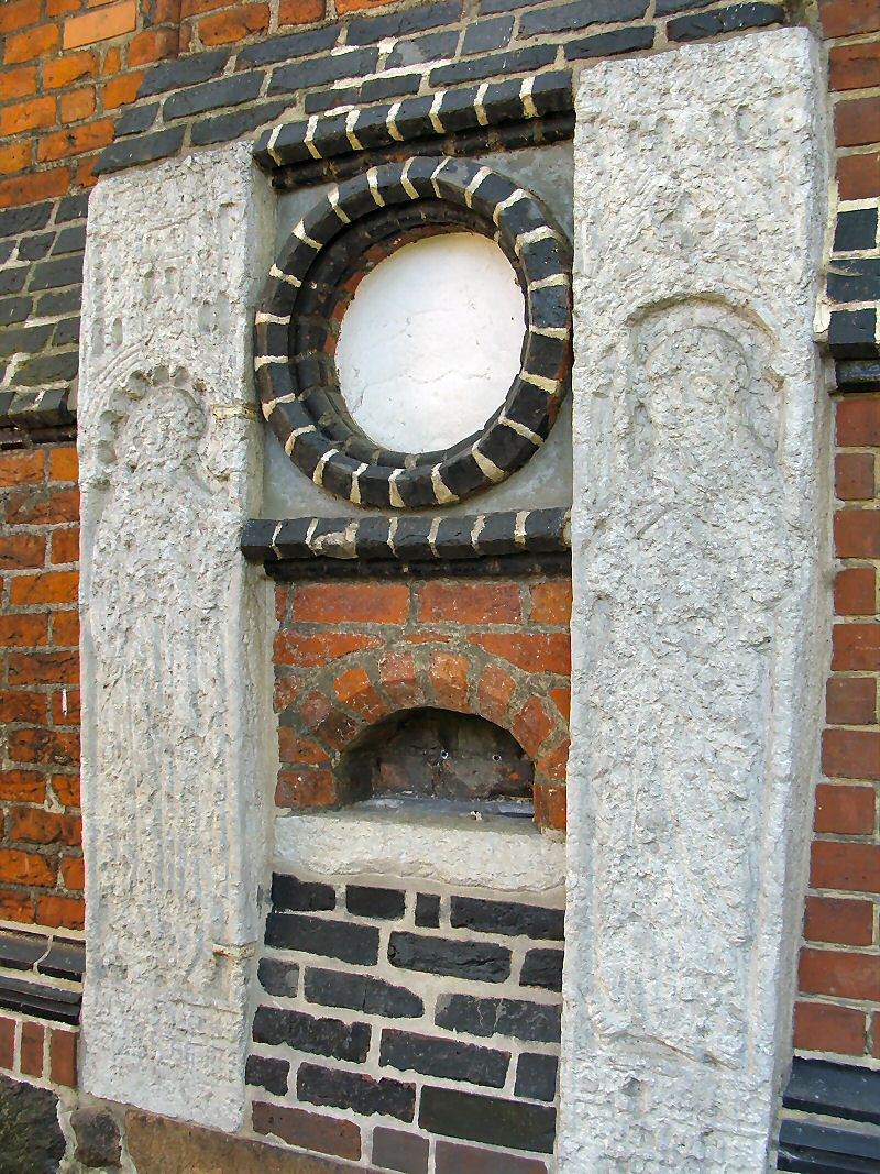 Szczecin - kościół św. Piotra i Pawła